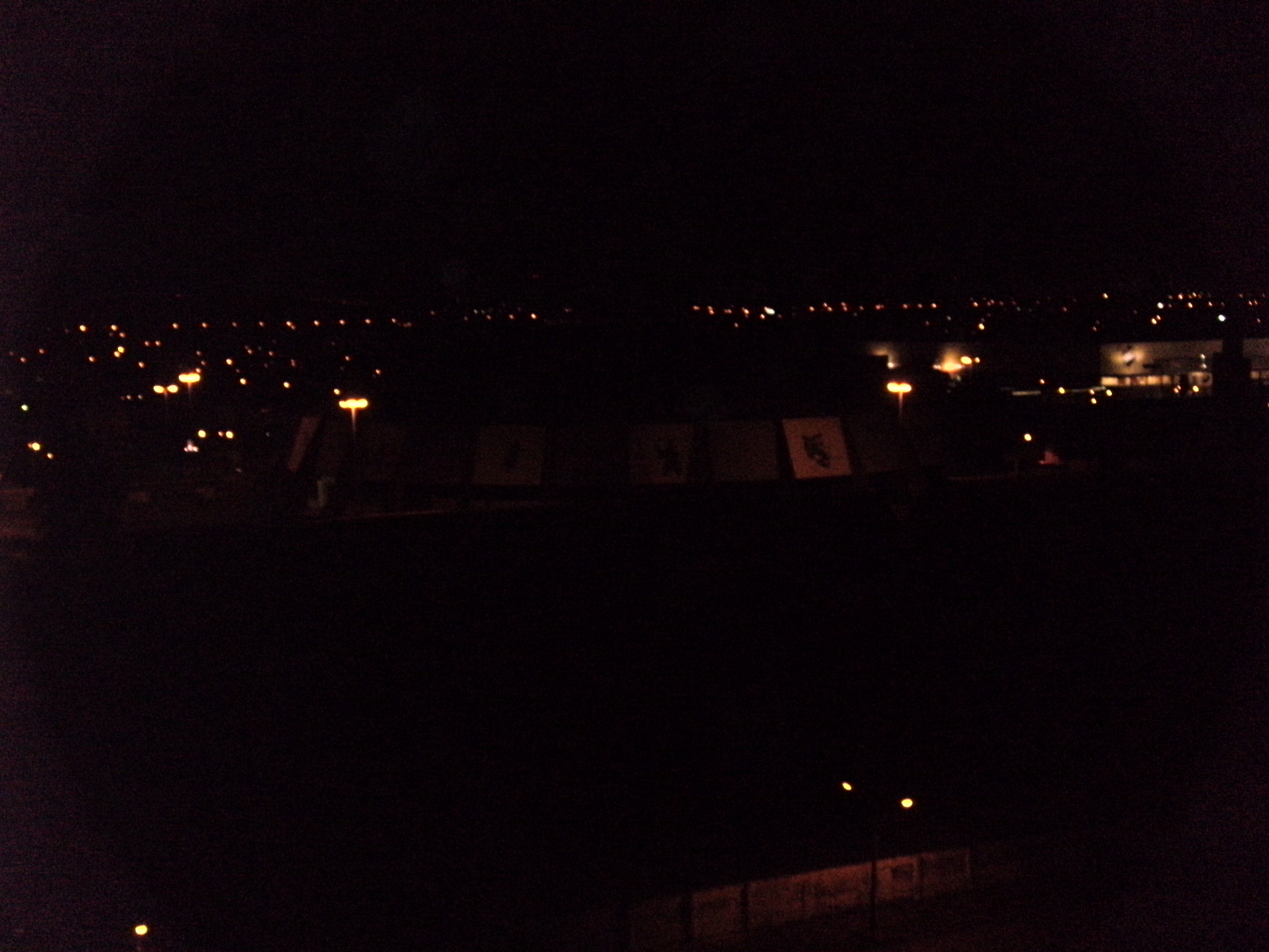 Ginásio de Esportes Geraldo Magalhães